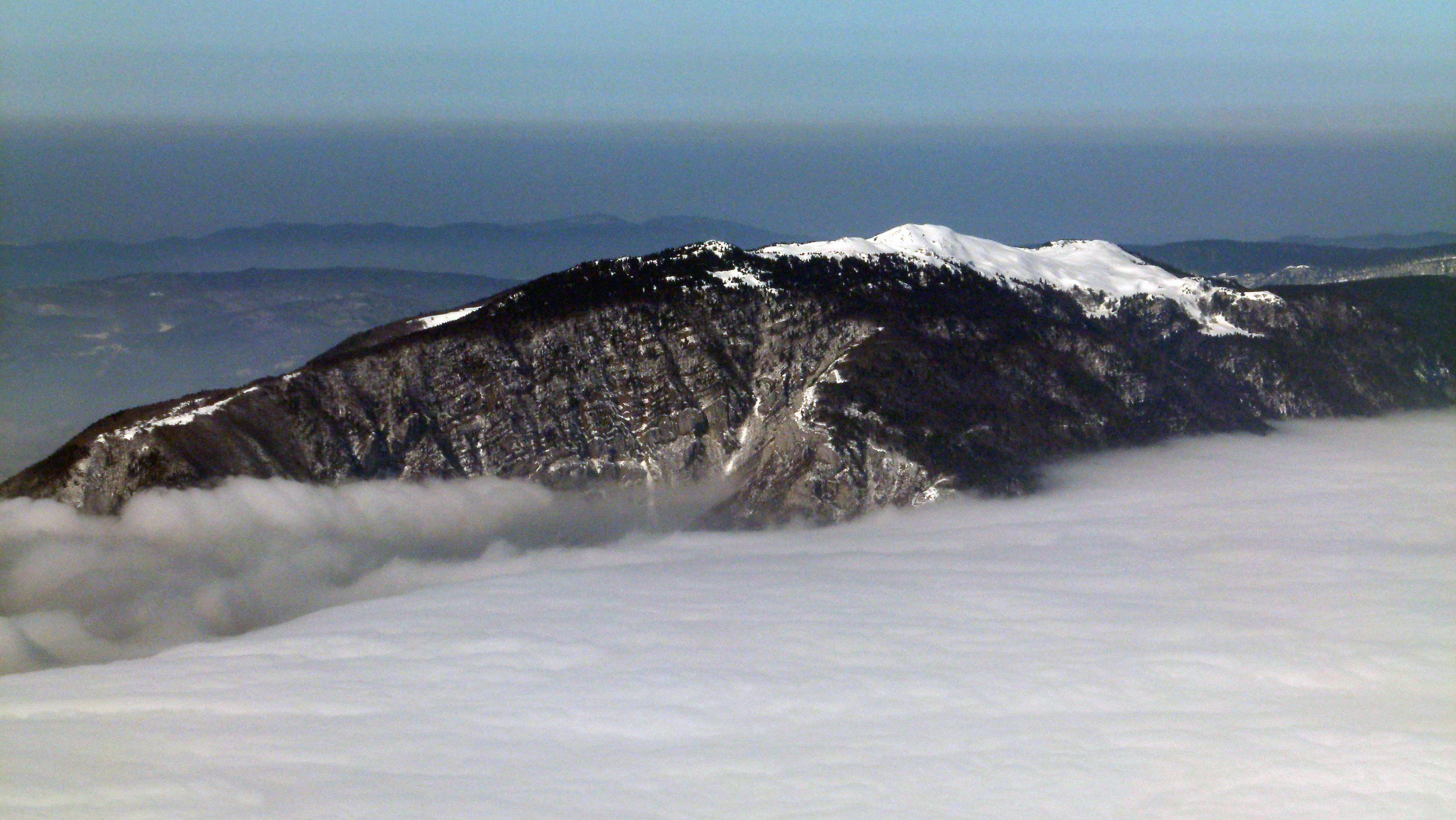 Blick vom Flugzeug auf den Grand Crêt d’Eau, einer Gruppe von Jura-Berggipfeln im französischen Département Ain mit dem höchsten ihrer Gipfel Crêt de la Goutte